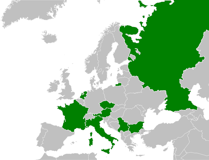 Reprezentacje biorące udział w Mistrzostwach Europy w Piłce Siatkowej Mężczyzn 1999.